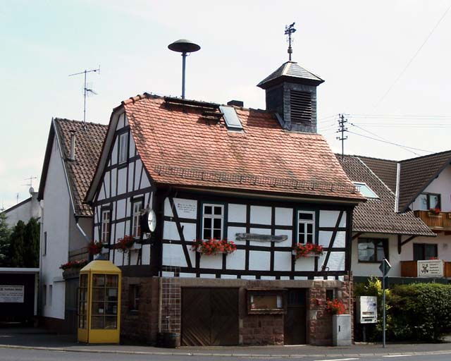 altes Neudorfer Fachwerkrathaus